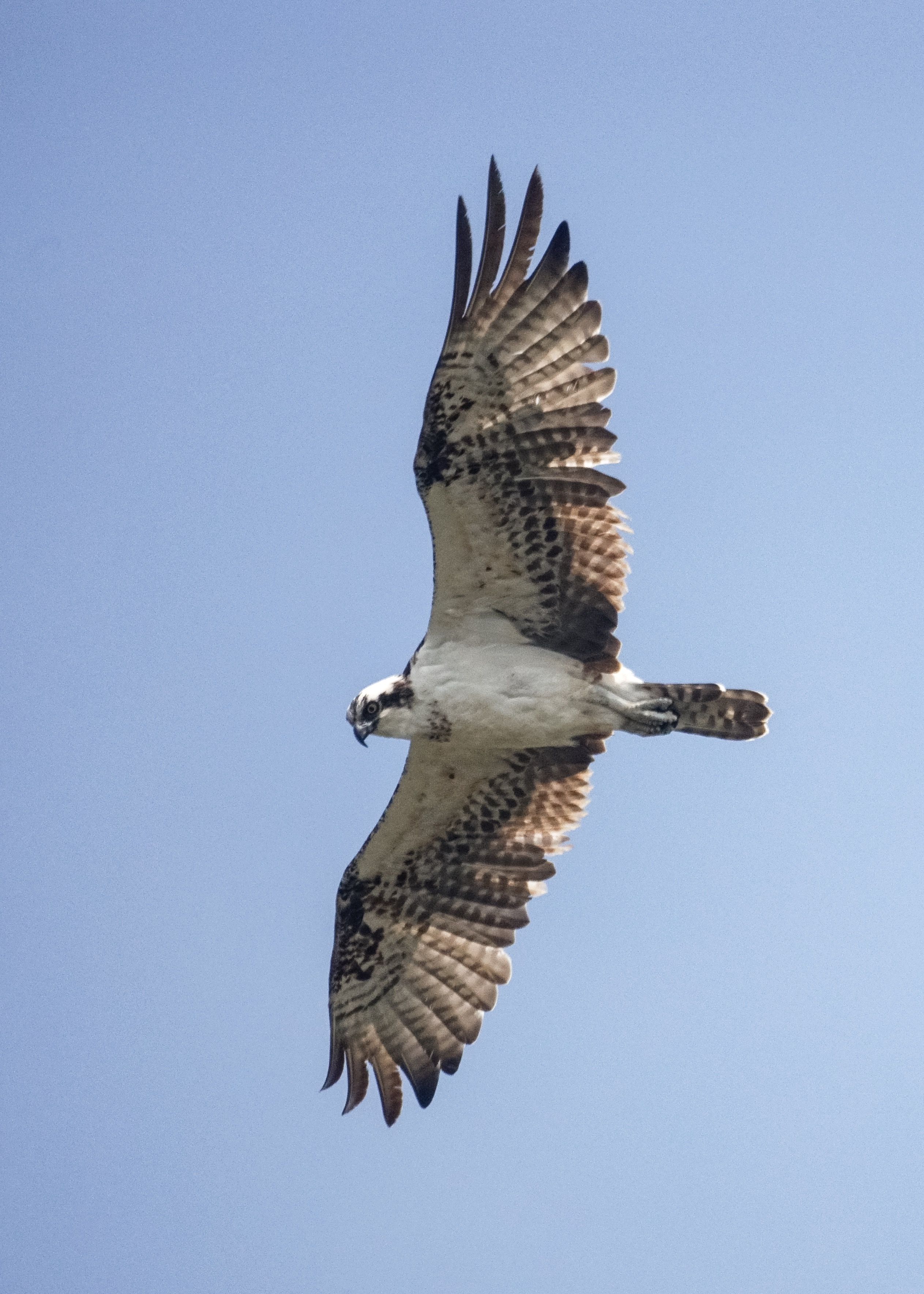 Osprey